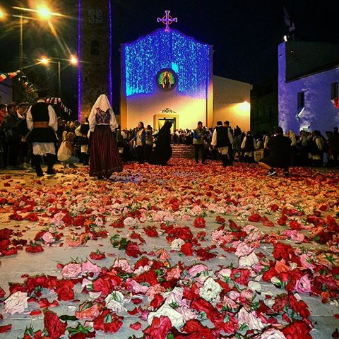 preparativi per il rientro del Simulacro della Vergine D'Itria. Piazza Giovanni XXIII Portoscuso 06 Giugno 2017